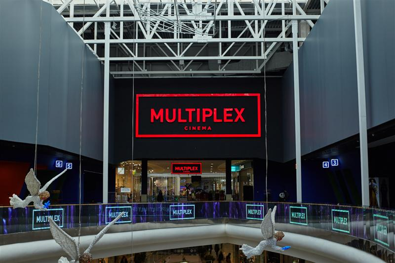 фойє кінотеатру